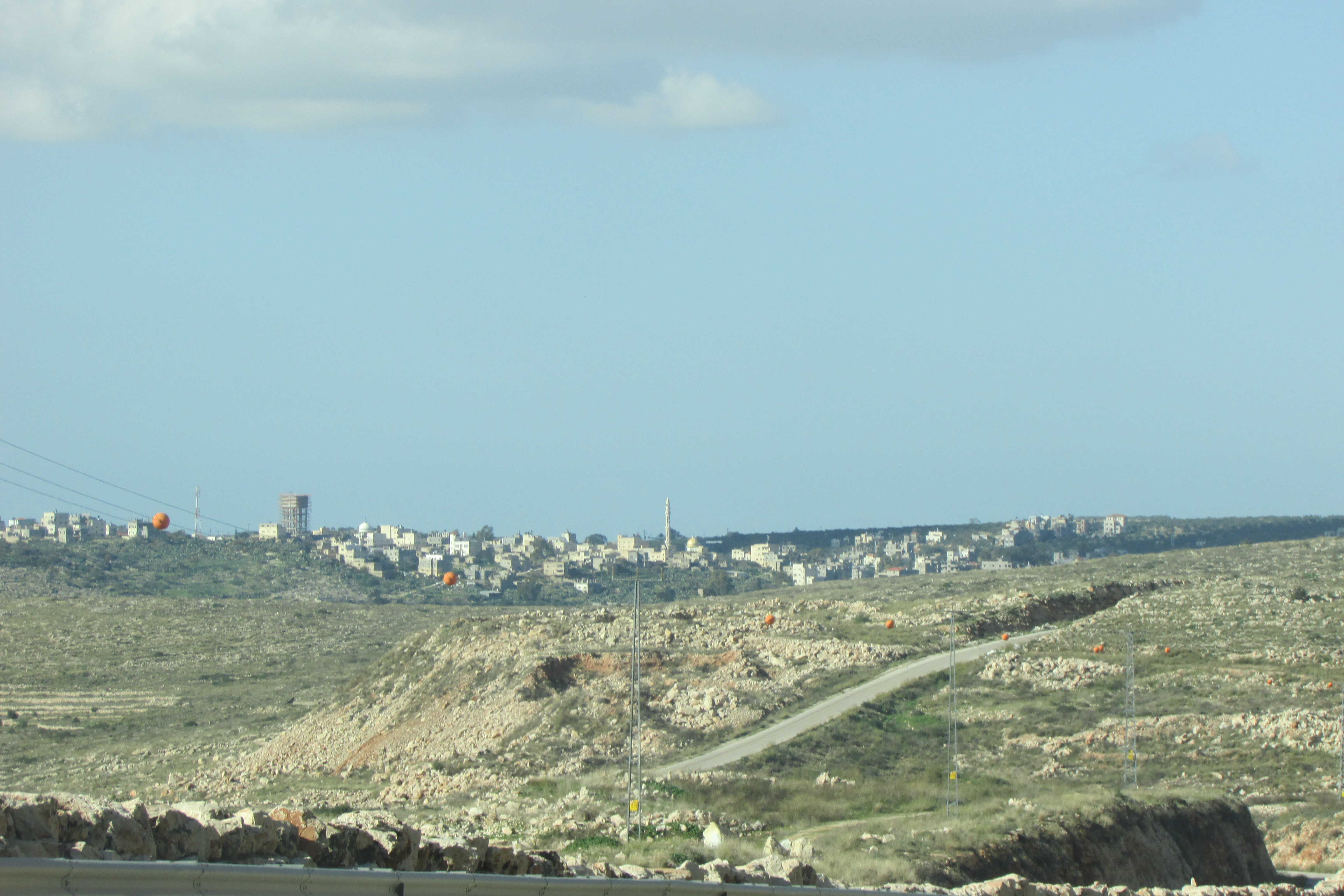 Rantis